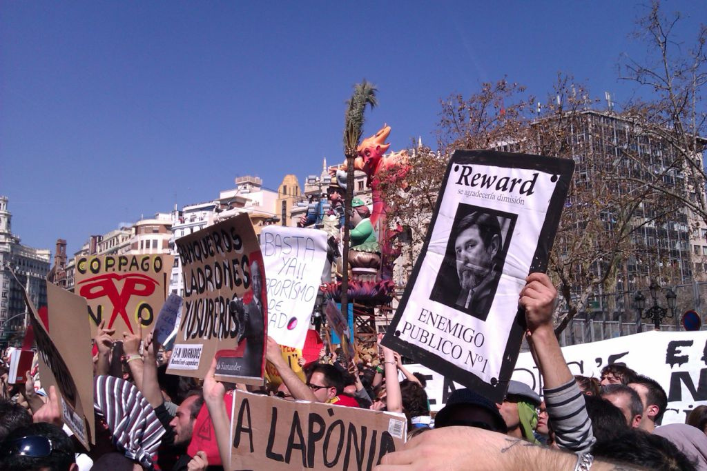 Intifalla carteles